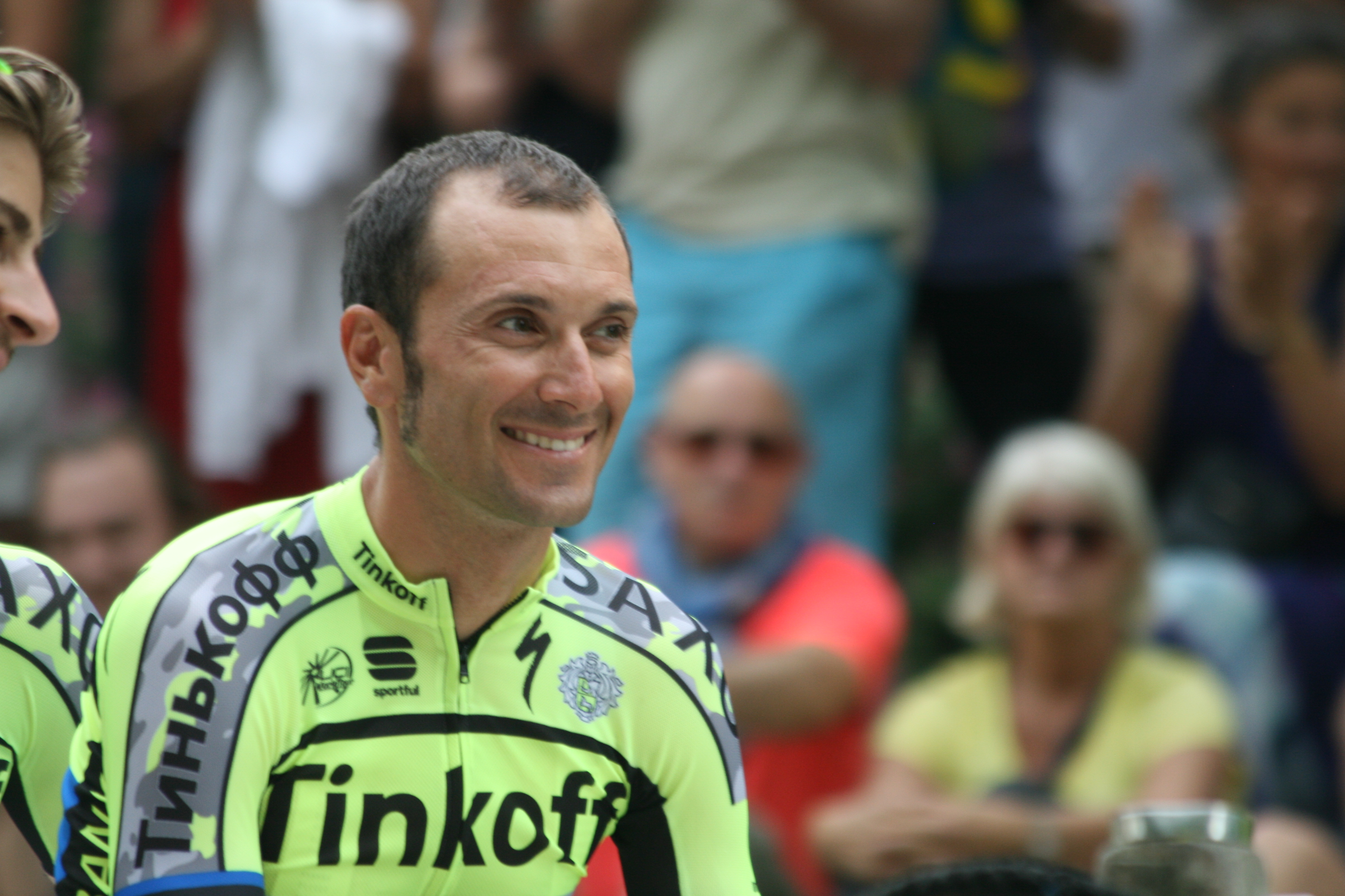 ploegenpresentatie Tour de France 2015 Utrecht